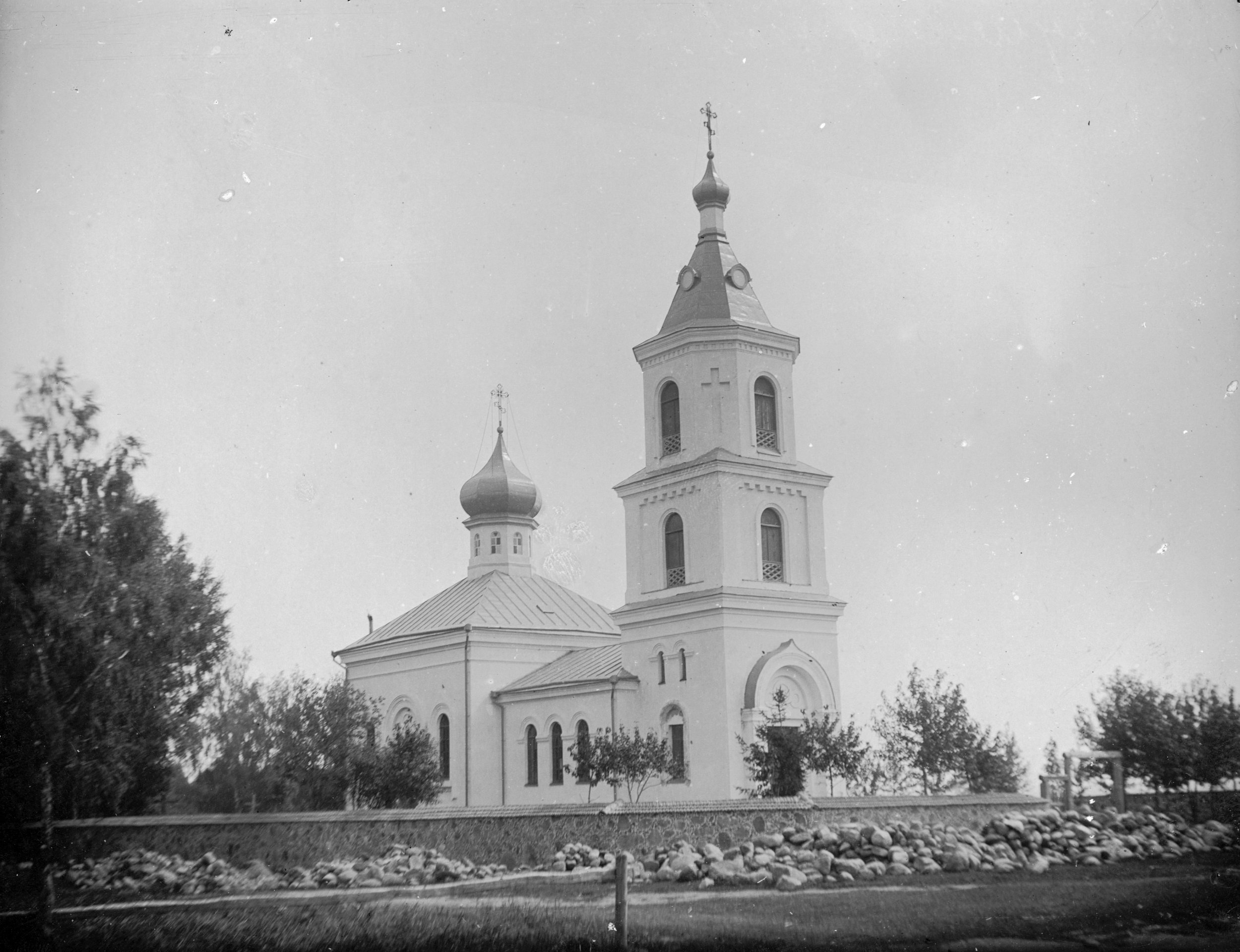 Беларуская (тарашкевіца): Крывічы (Kryvičy). Траецкая царква-мураўёўка